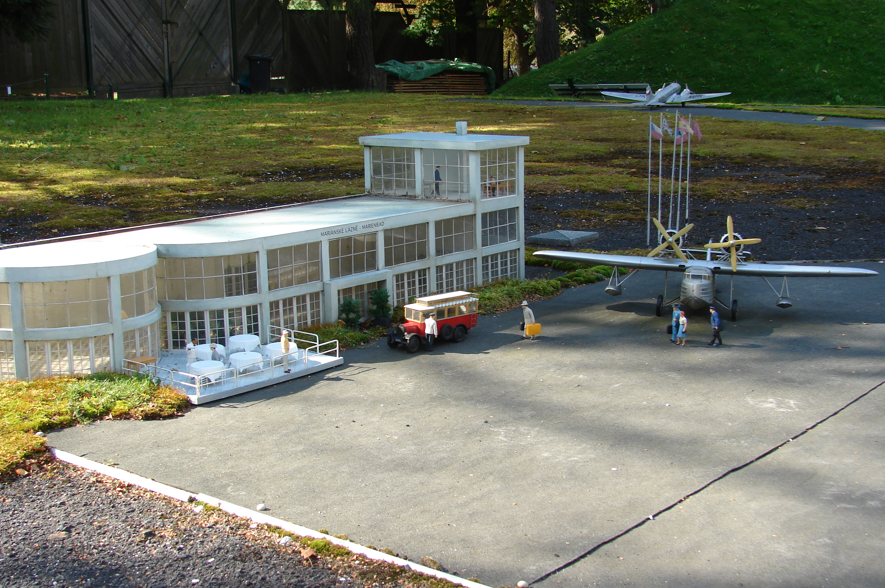 Mariánské Lázně - odbavovací budova letiště